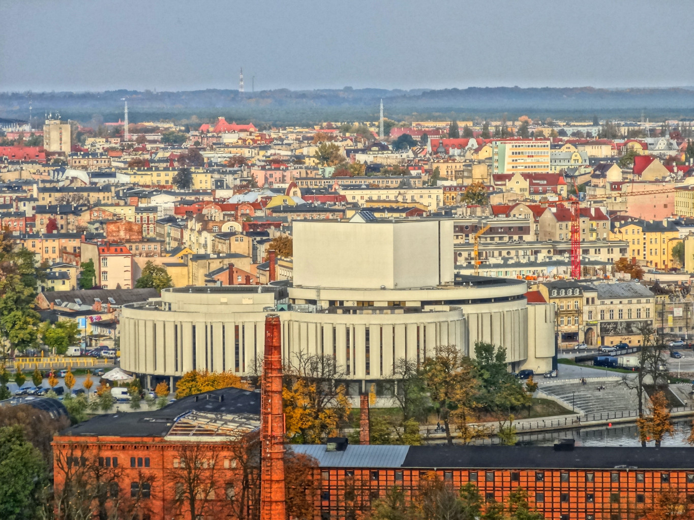 Budynek Opery Nova, zbud. w latach 1973-2006 w Bydgoszczy, ul. Ferdynanda Focha 5 - widok z wieży ciśnień